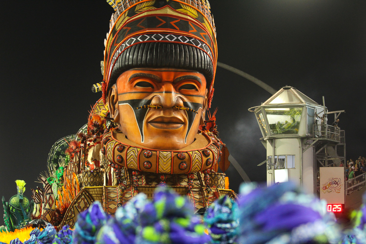 Desfile das Escolas de Samba de SP